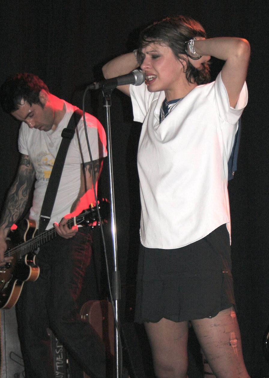 Jana Pallaske und Spitting Off Tall Buildings live im Heidelberger Karlstorbahnhof